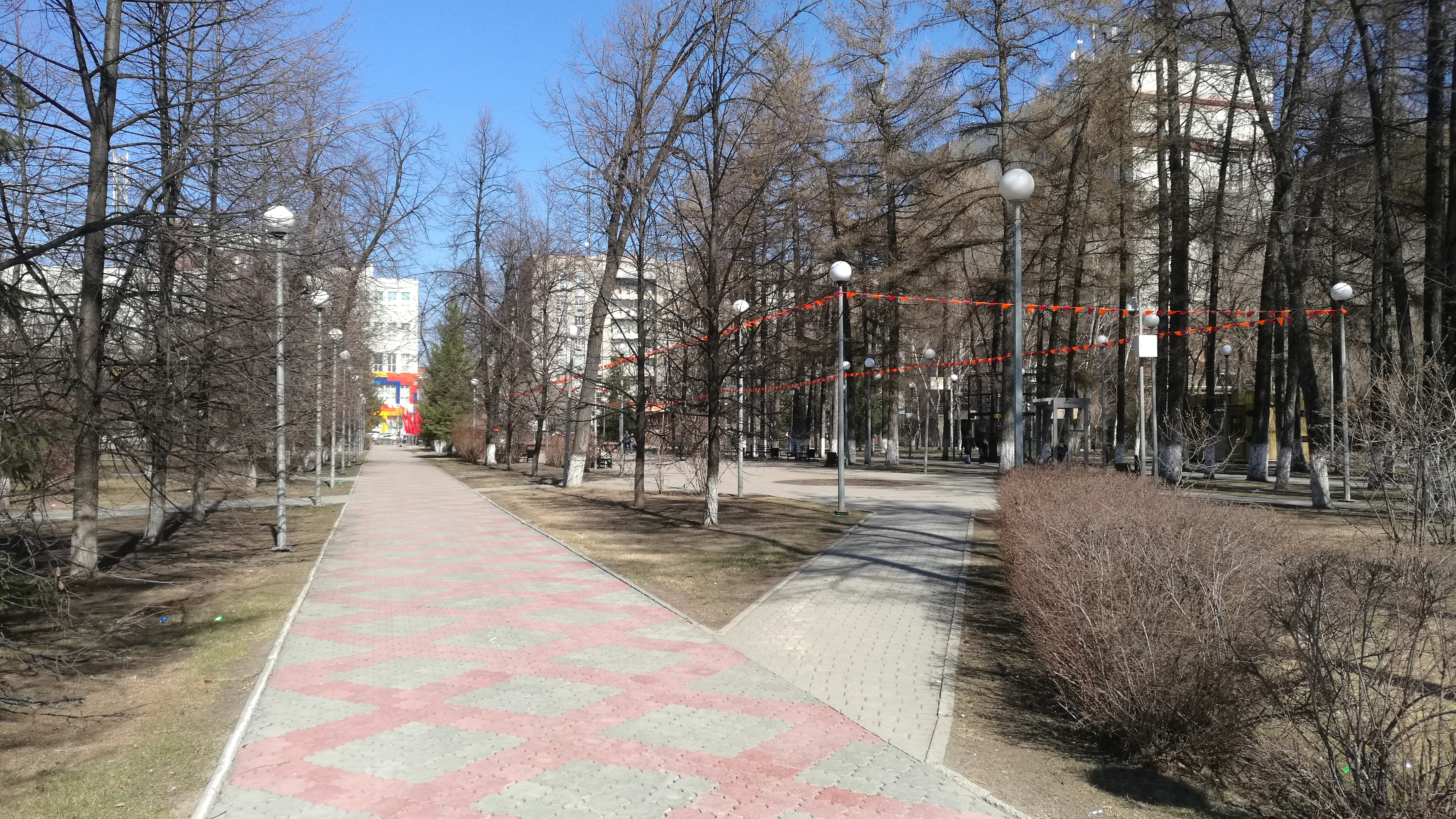 Skvaro de Nemcov. Tjumeno, Rusio.